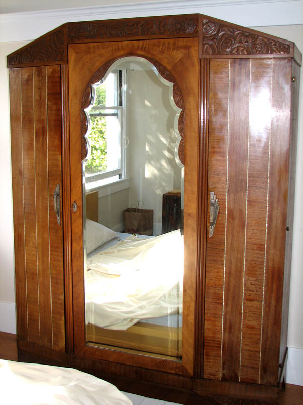 Une armoire française de style Art Déco, fabriquée dans les années 30.